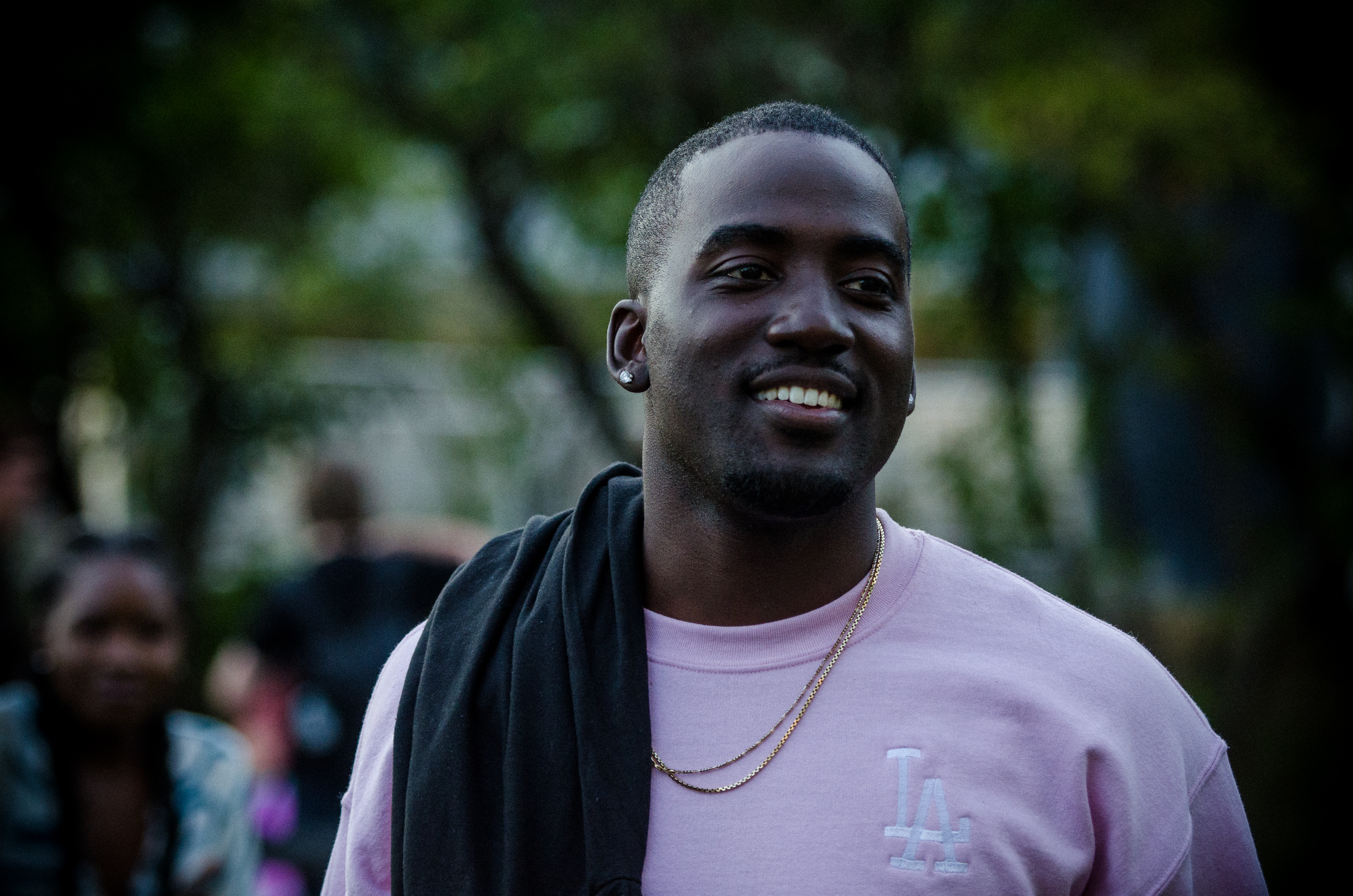 Shamier